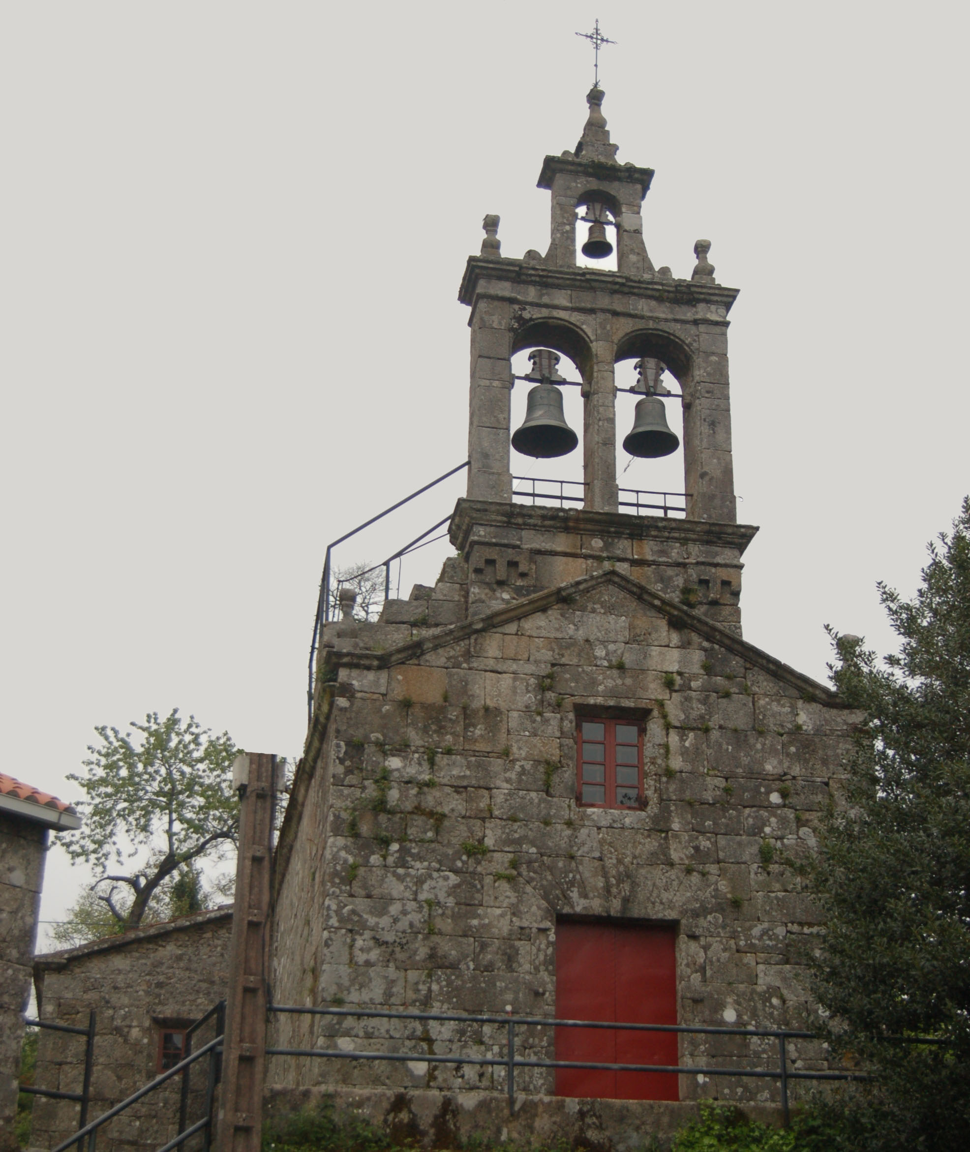 Igrexa parroquial de San Xoán de Meavía (Forcarei)